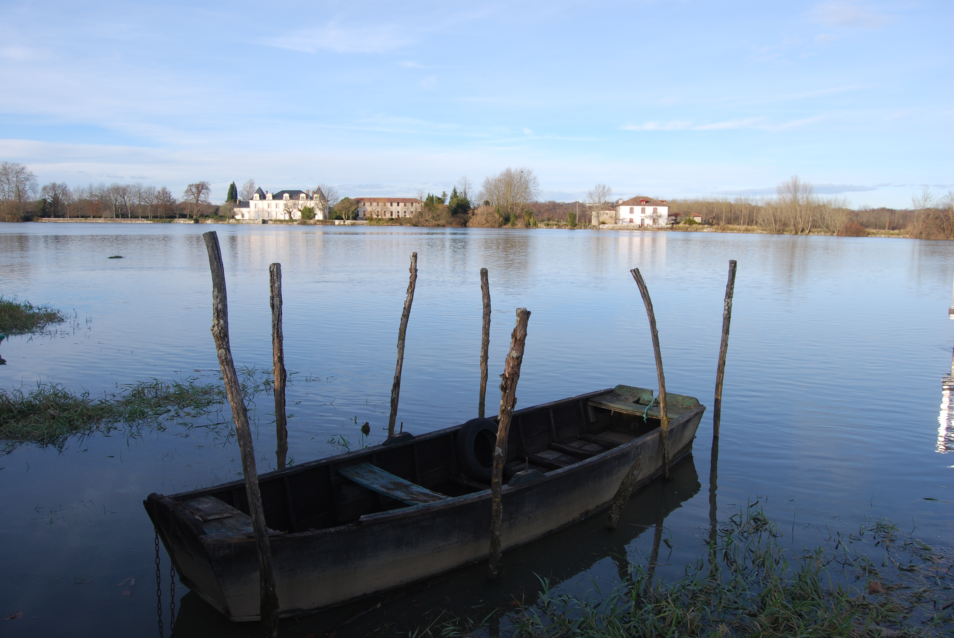 Une barque au port d'Urt, sur l'Adour, et le château de Montpellier en fond.